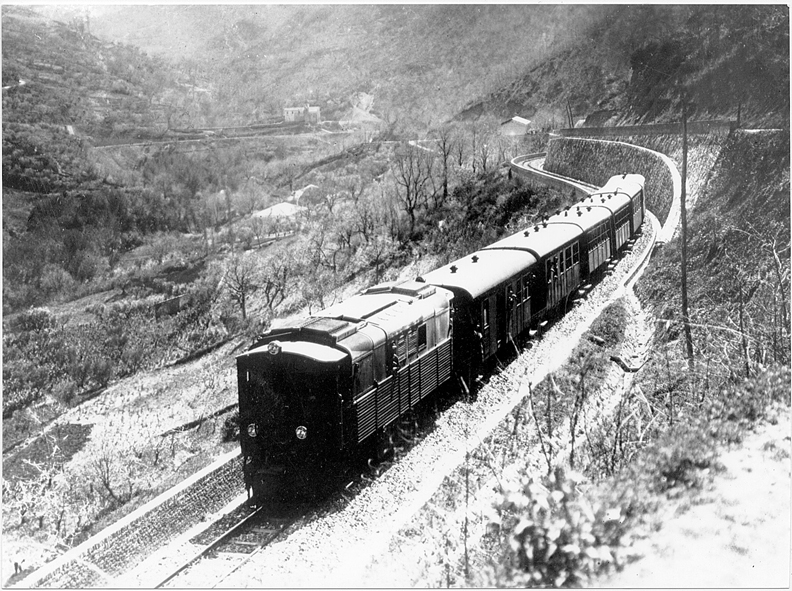 Una delle prime locomotive diesel-elettriche